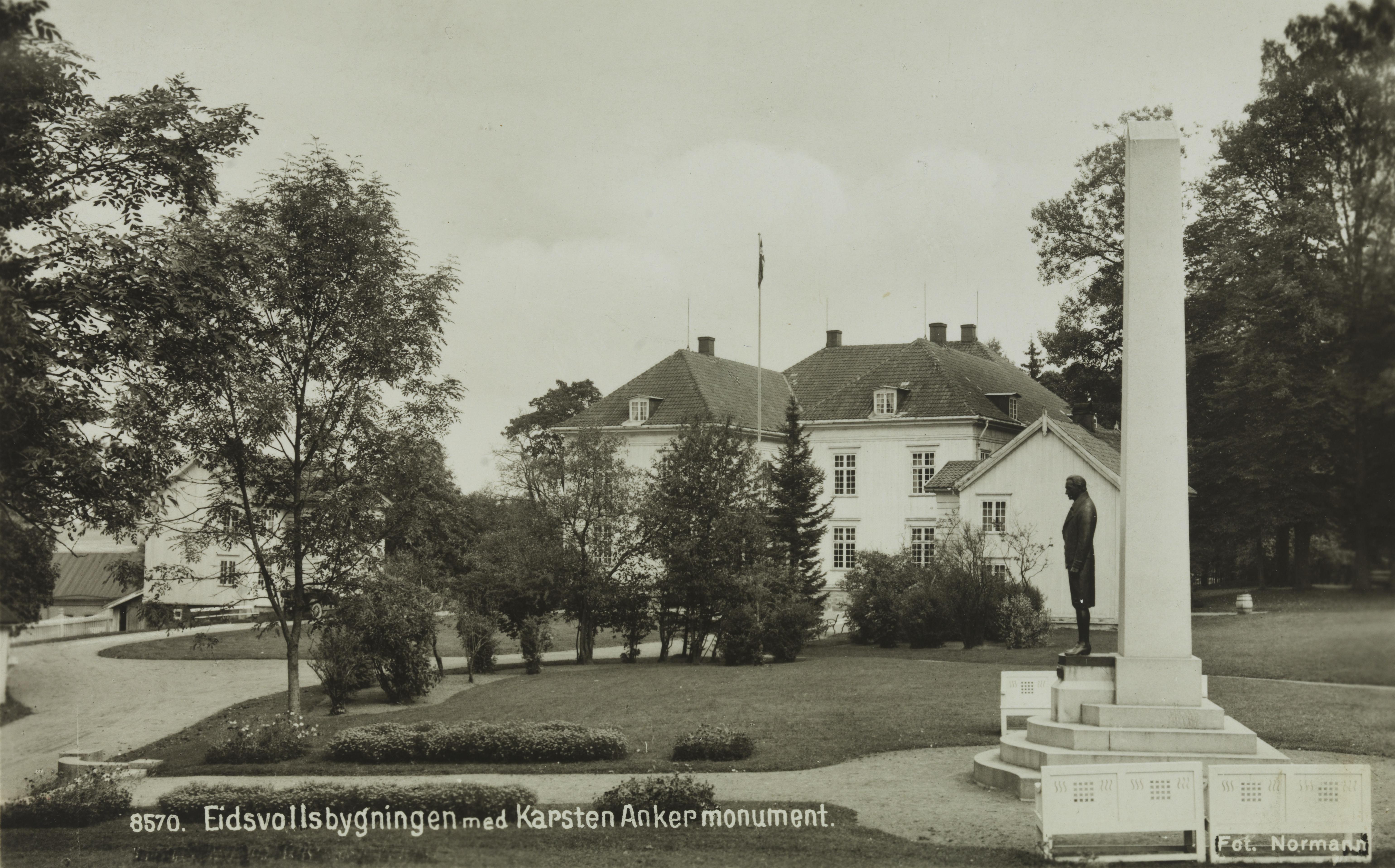 Bildet er hentet fra Nasjonalbibliotekets bildesamling Eidsvoll,Eidsvollsbygningen, Eidsvoll, Akershus